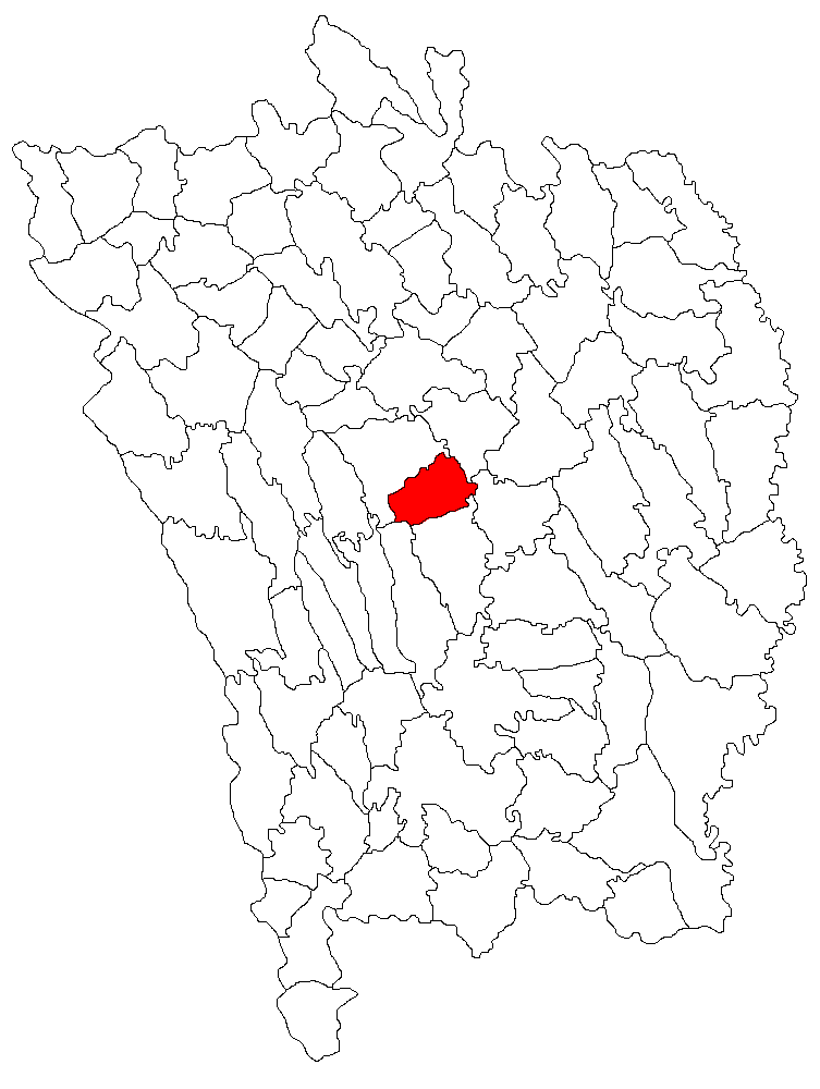 Categorie:Hărţi ale judeţului Vaslui